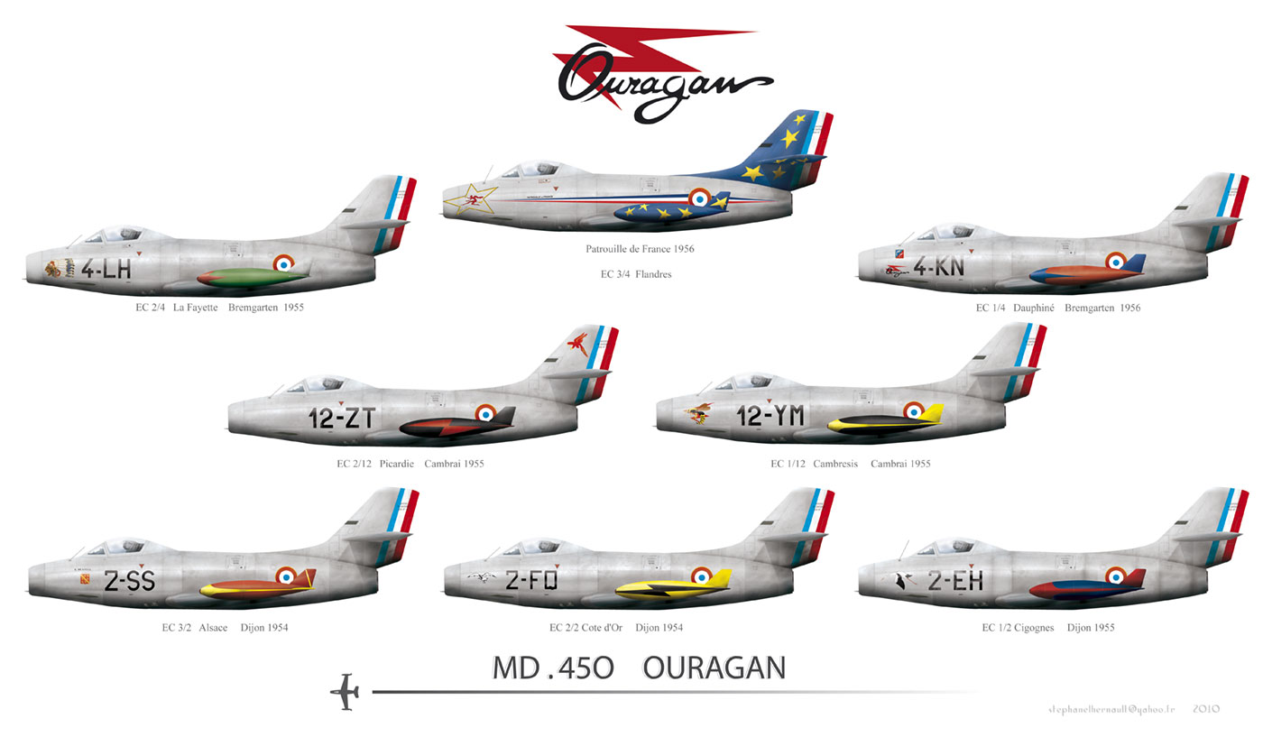 Avions Marcel DAssault MD 450 Ouragan 2° 4° 12° Escadre de Chasse